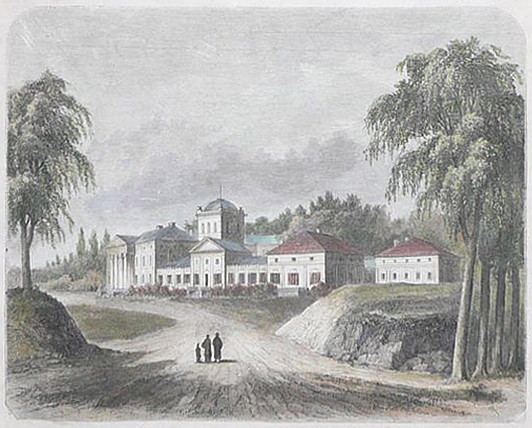 Беларуская (тарашкевіца): Добасна (Dobasna), сядзіба Булгакаў (Bułhak)